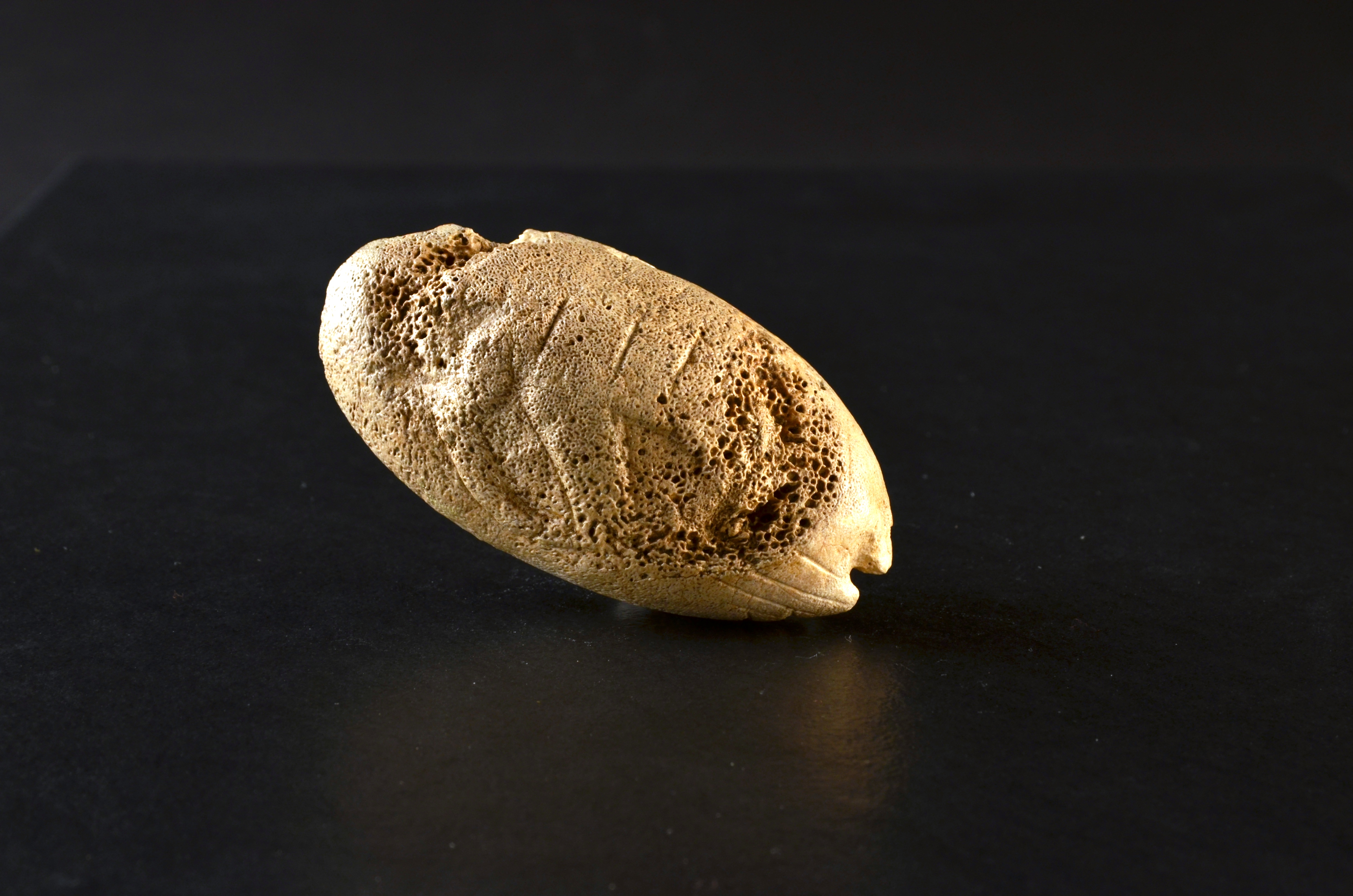 super sache